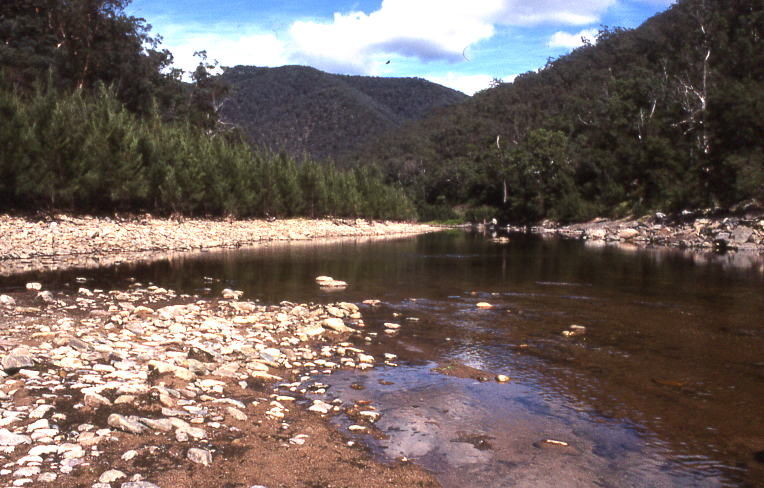 river, blue mts, australia